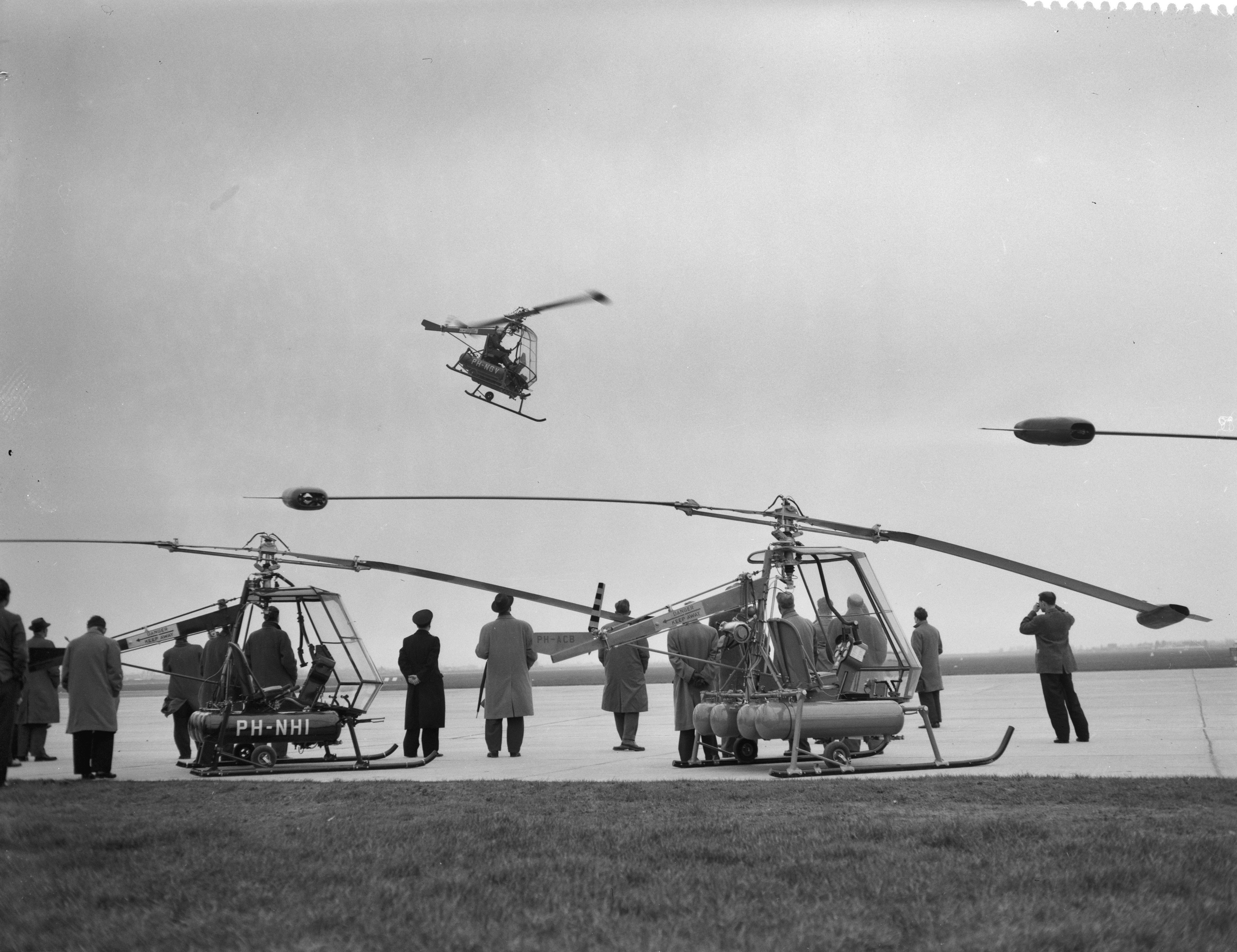 Collectie / Archief : Fotocollectie Anefo Reportage / Serie : [ onbekend ] Beschrijving : Uitreiking bewijs van Luchtvaardigheid voor de Kolibri op het vliegveld Zestienhoven te Rotterdam Datum : 3 maart 1958 Locatie : Rotterdam, Zuid-Holland Trefwoorden : Uitreikingen, bewijzen, vliegvelden Persoonsnaam : Kolibri Instellingsnaam : Zestienhoven Fotograaf : Rossem, Wim van / Anefo Auteursrechthebbende : Nationaal Archief Materiaalsoort : Negatief (zwart/wit) Nummer archiefinventaris : bekijk toegang 2.24.01.04 Bestanddeelnummer : 909-3781